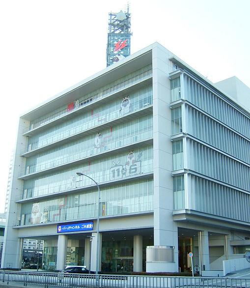 名古屋市中区東別院にある名古屋テレビ放送(メ～テレ)本社社屋。